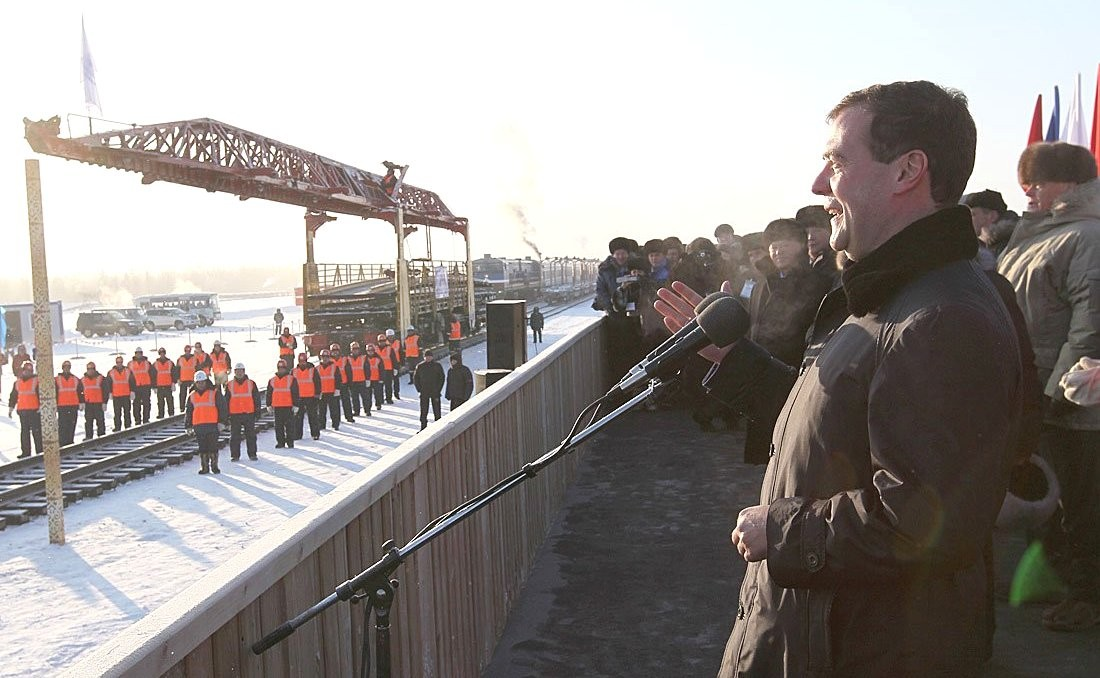 На церемонии открытия участка железной дороги Беркакит – Томмот – Нижний Бестях.